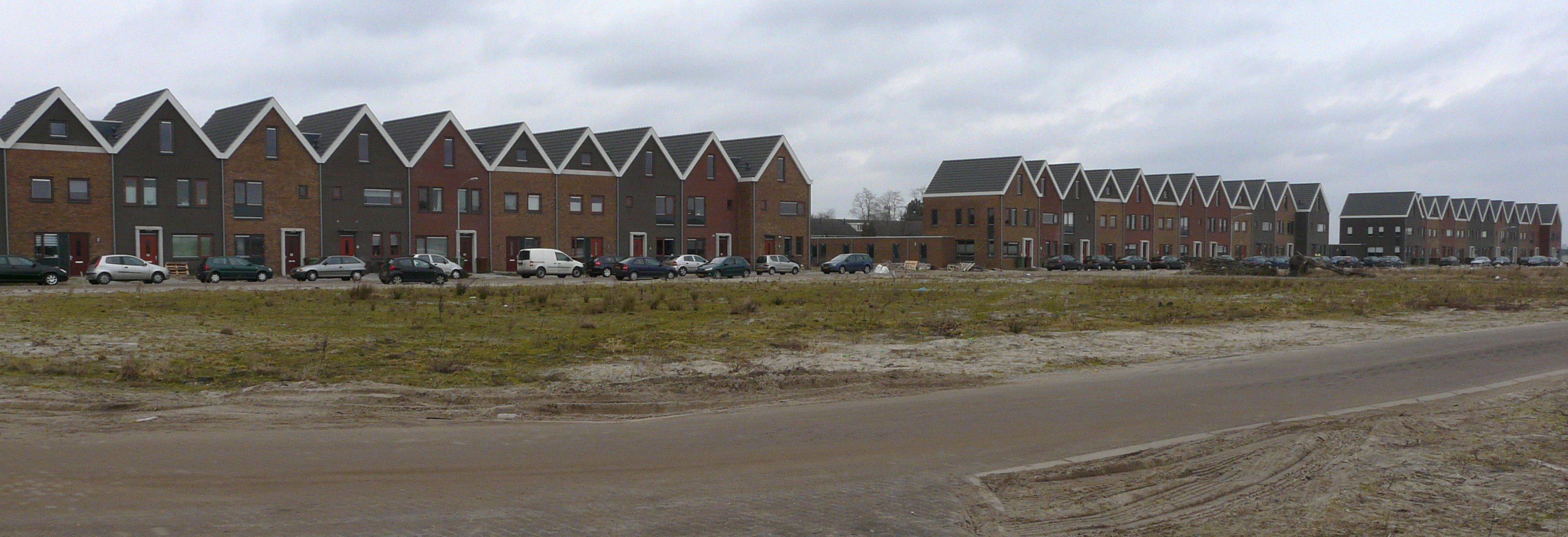 Zicht op woningen in een deel van de wijk Waterdonken in het noorden van Breda